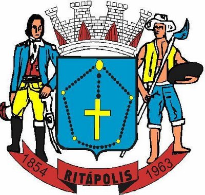 Brasão do município de Ritápolis, Minas Gerais, Brasil.